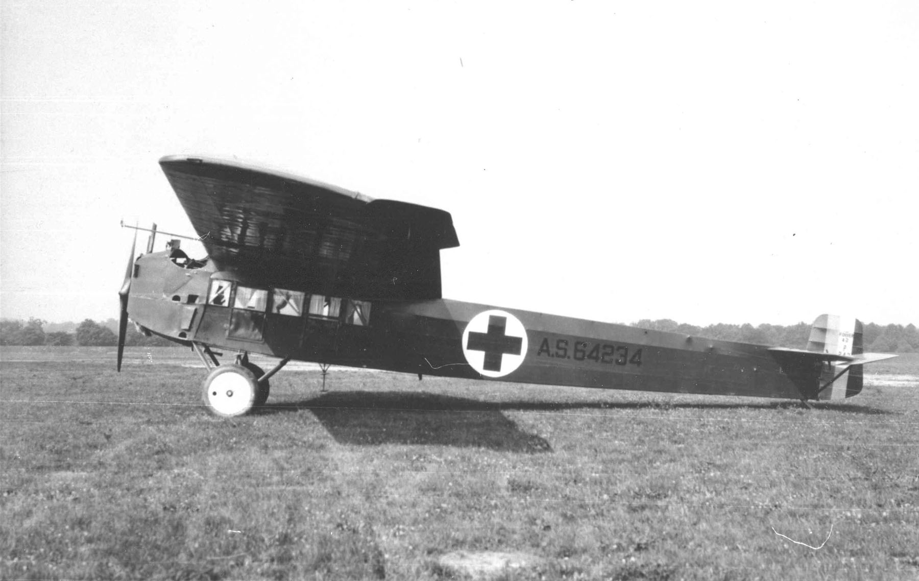 Fokker A-2